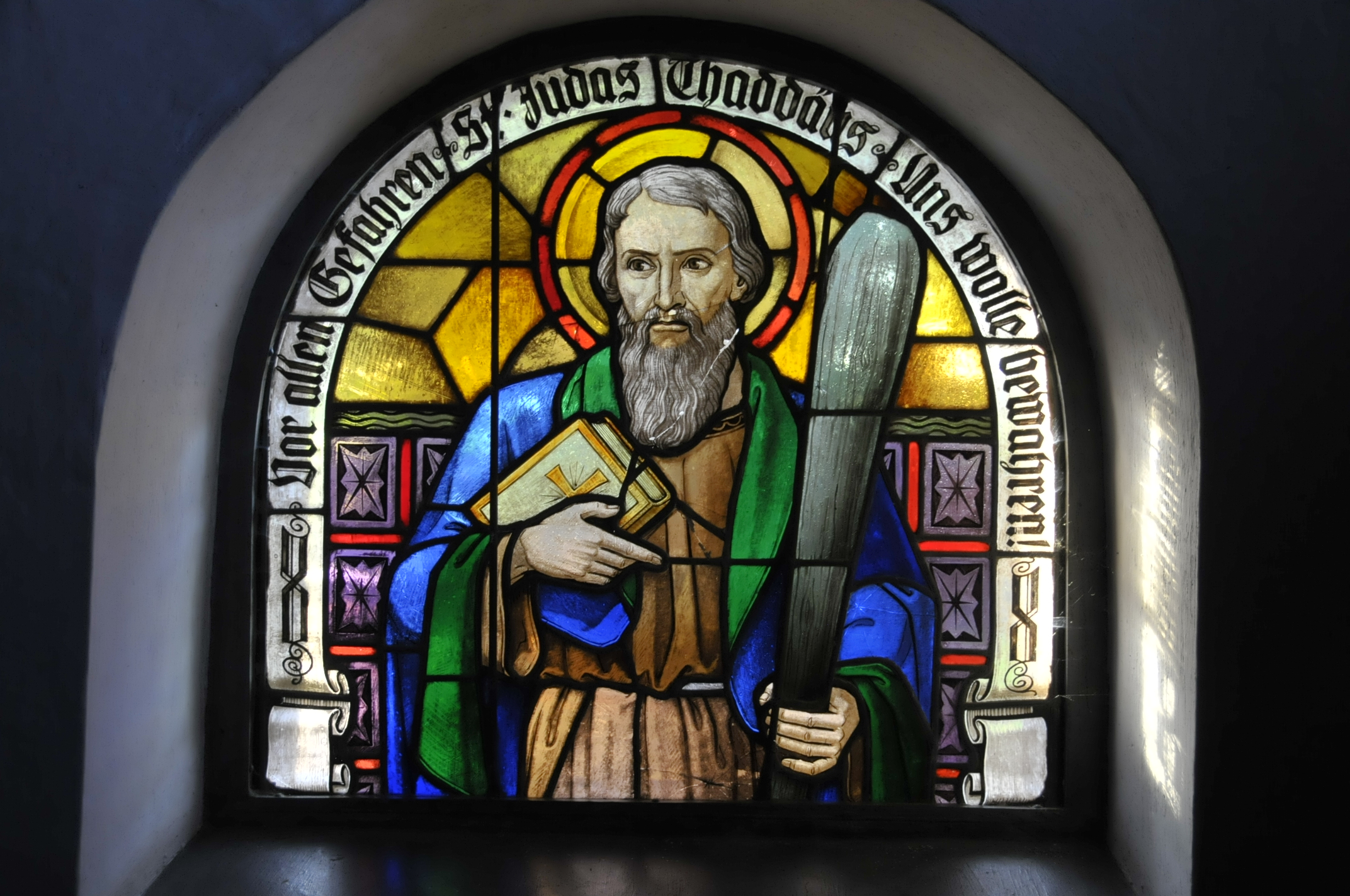 Mechernich-Holzheim, Kirchenfenster im Vorraum